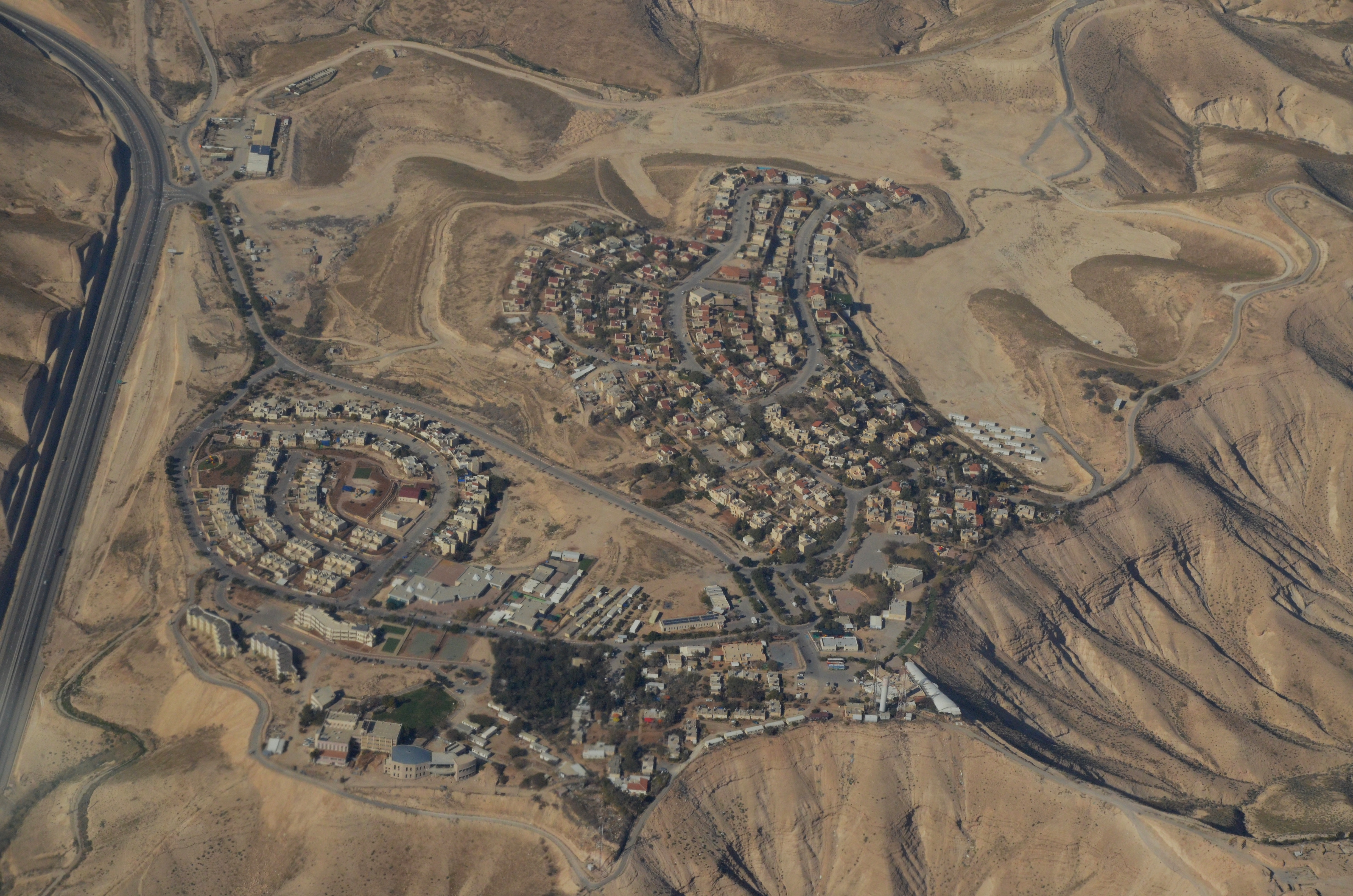 מצפה יריחו